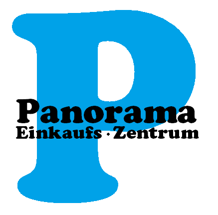 Logo Panorama Einkaufszentrum